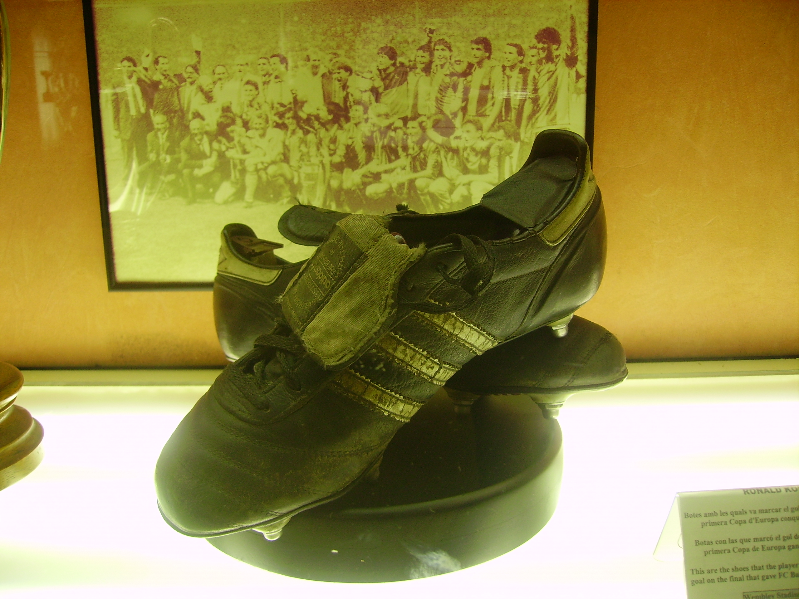 Botes que duia Ronald Koeman el 20/05/1992 a Wembley, exposades al Museu del Futbol Club Barcelona.